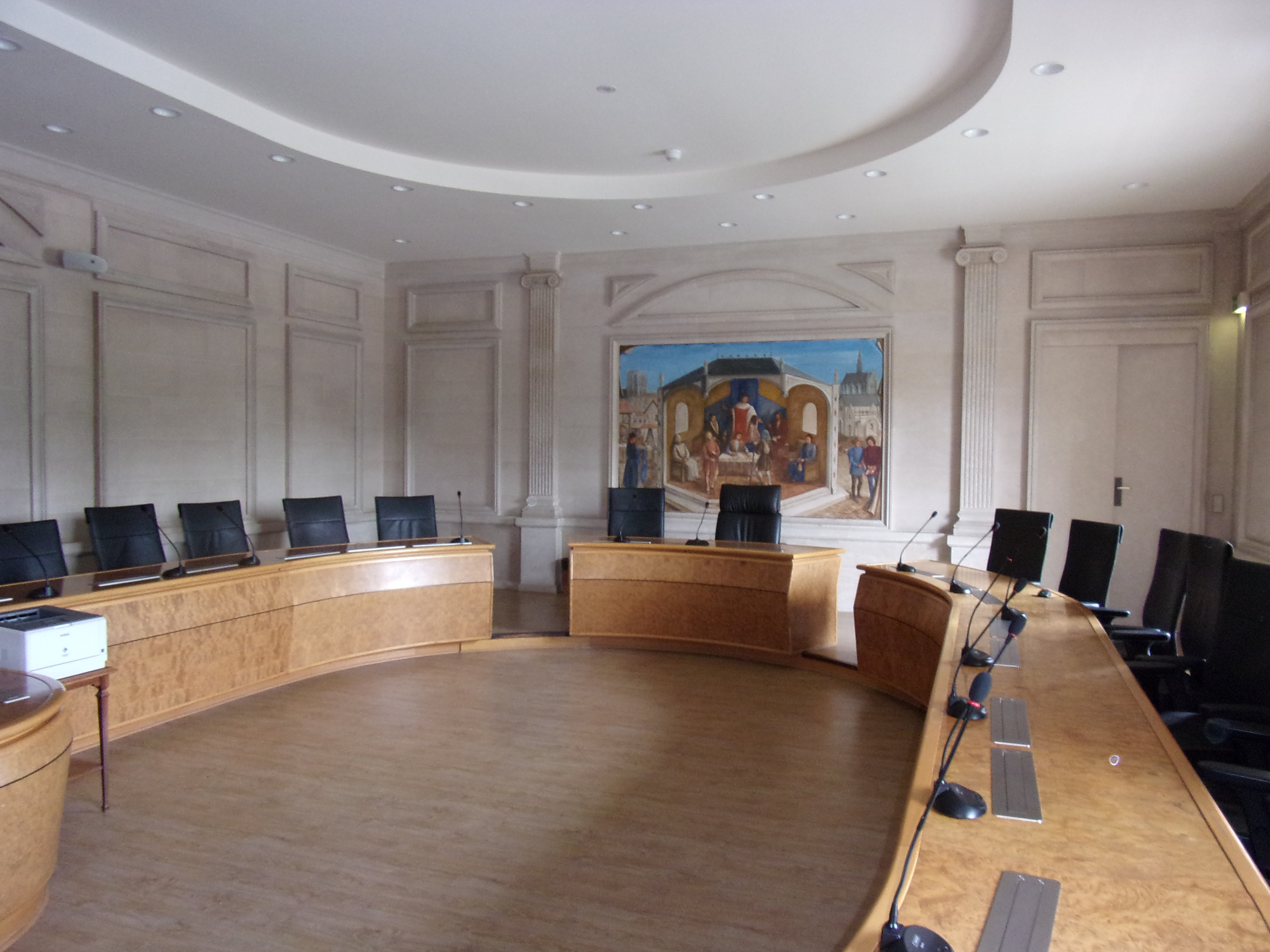 Salle d'audience de la Troisième chambre civile (vue depuis le fond de la salle, côté public). Photo prise le 14 juin 2019.